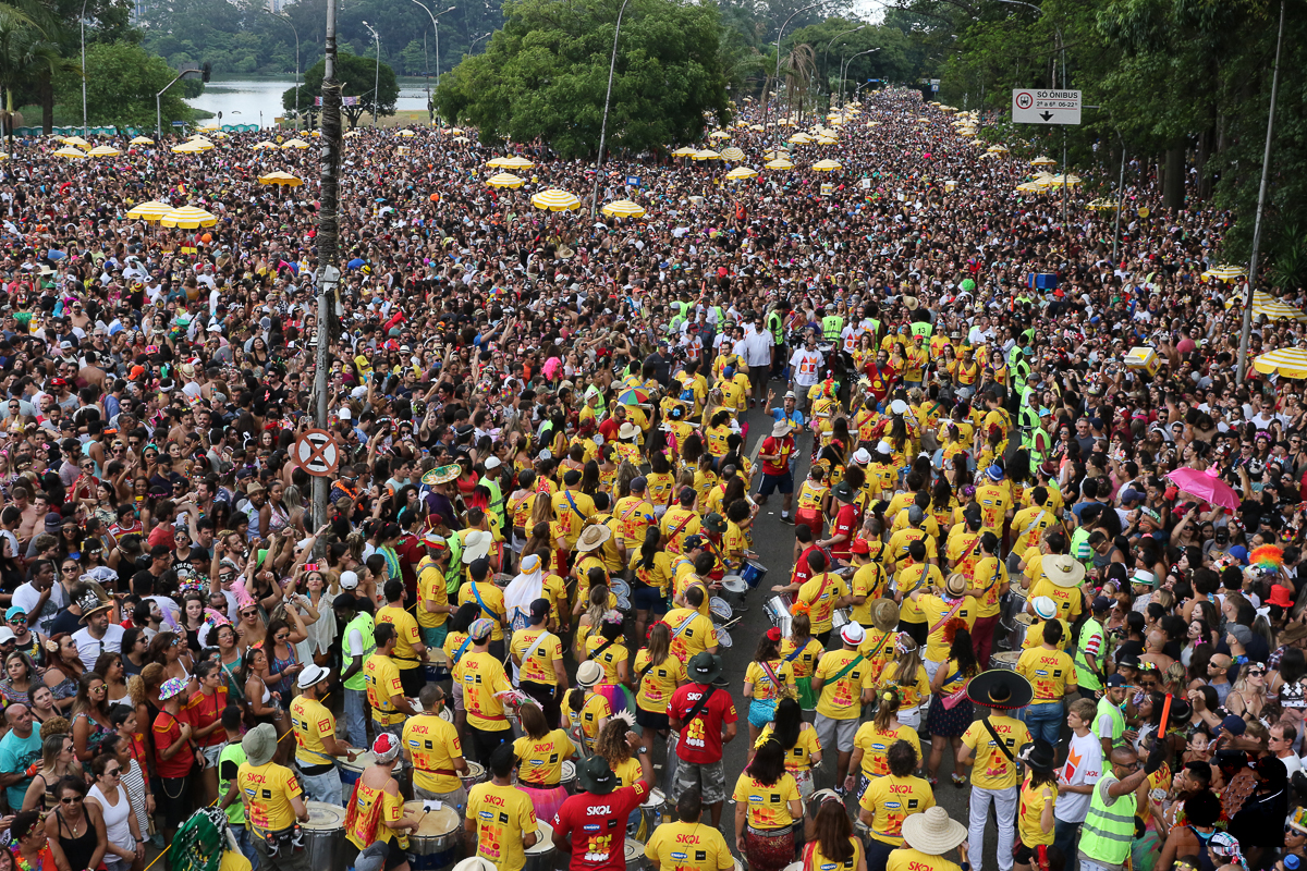 Monobloco